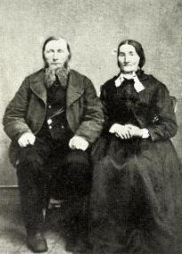 Johan Peter (J.P.) Holan (1825–1894) og hustru Bolette Oline Johnsdatter Rømo. Han var gårdbruker på Ner-Holan på Skatval, ordfører i Nedre Stjørdalen herred 1858–1860 og lokalhistoriker.